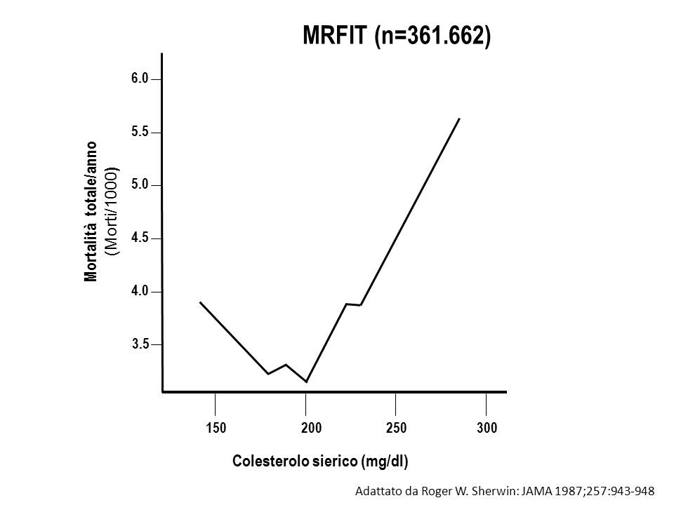 Rapporto mortalità totale e colesterolemia totale nello studio MRFIT